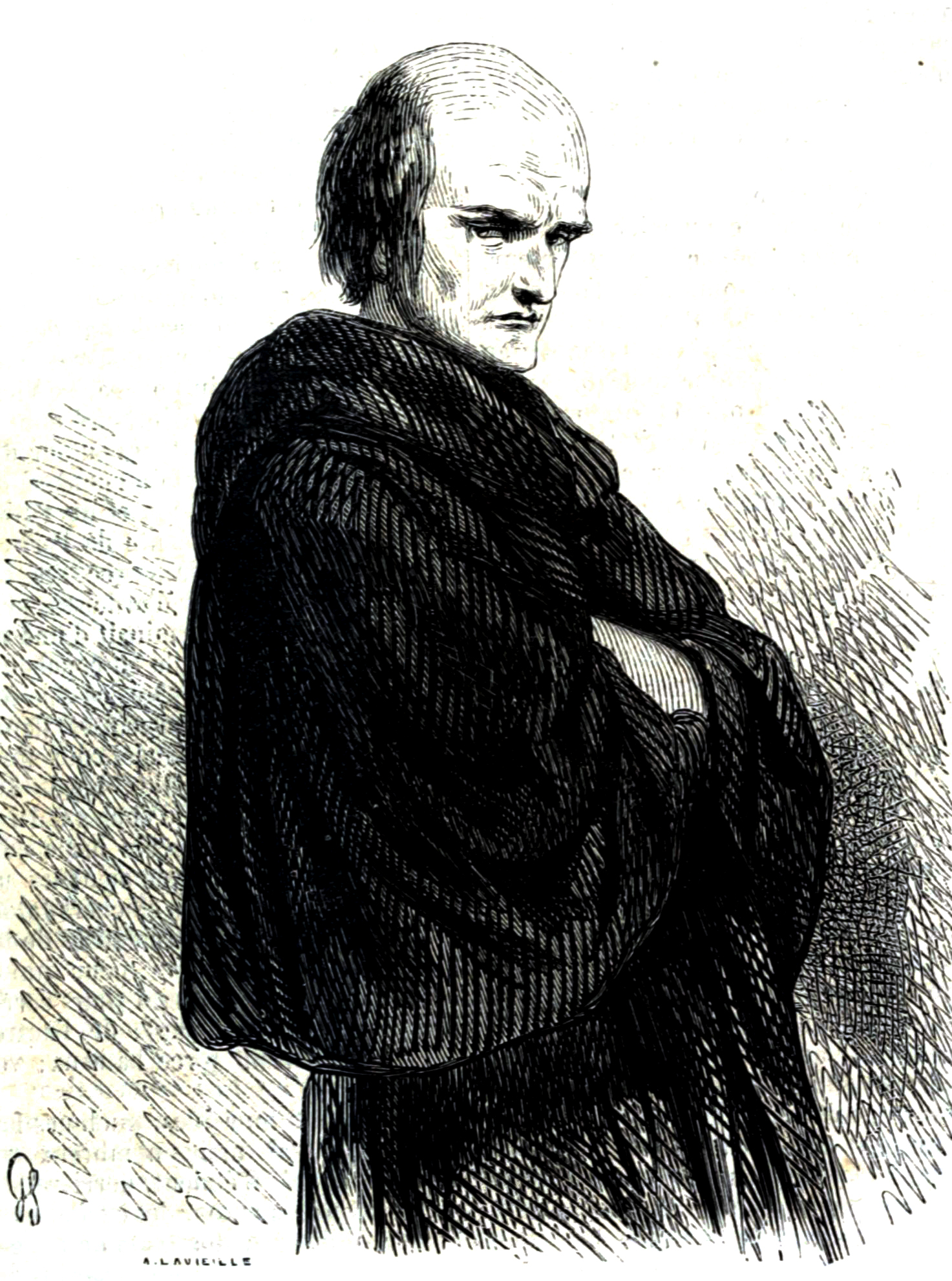 Ксилография Jacques Adrien Lavieille по иллюстрации Jean Alfred Gérard-Séguin к роману Виктора Гюго «Собор Парижской Богоматери» издания 1853 года (том 1, стр. 41)